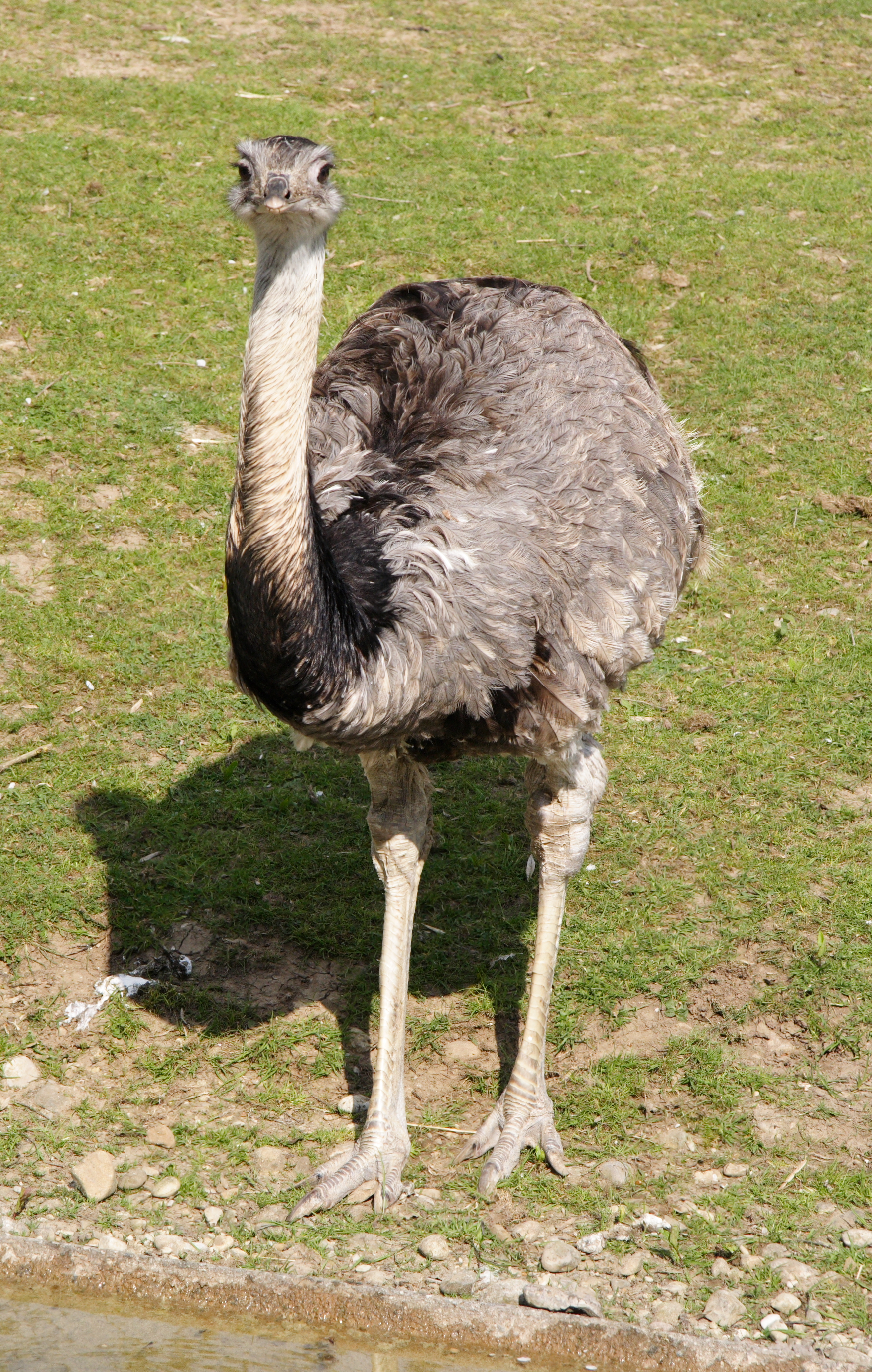 Eigene Aufnahmen, zuerst veröffentlicht hier: Nandu Henne, Tierpark Hellabrunn